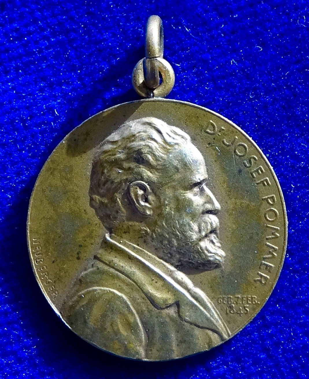 Wien 1905, Jugendsti-Medaille Josef Pommers 60. Geburtstag D. = 21 mm, Bronze Pommer, Dr Josef, Mitglied der Burschenschaft Silesia Wien, Antisemit, 1845 Mürzzuschlag, Österreich - 1918 Gröbming Brb. r., r. bogig: "DR. JOSEF POMMER", r. unten 2 Z.: "GEB. 7. FEB. 1845"/ 8 Z.: ZUM 60. GEBURTSTAGE 7. FEB. 1905 - DER DEUTSCHE VOLKSGESANG-VEREIN IN WIEN". Wurzbach -. Künstler: (Rudolf) Neuberger, Medailleur in Wien, Schüler von Scharff, 1861 Wien - 1916 Wien Erhaltung: Vorzüglich.